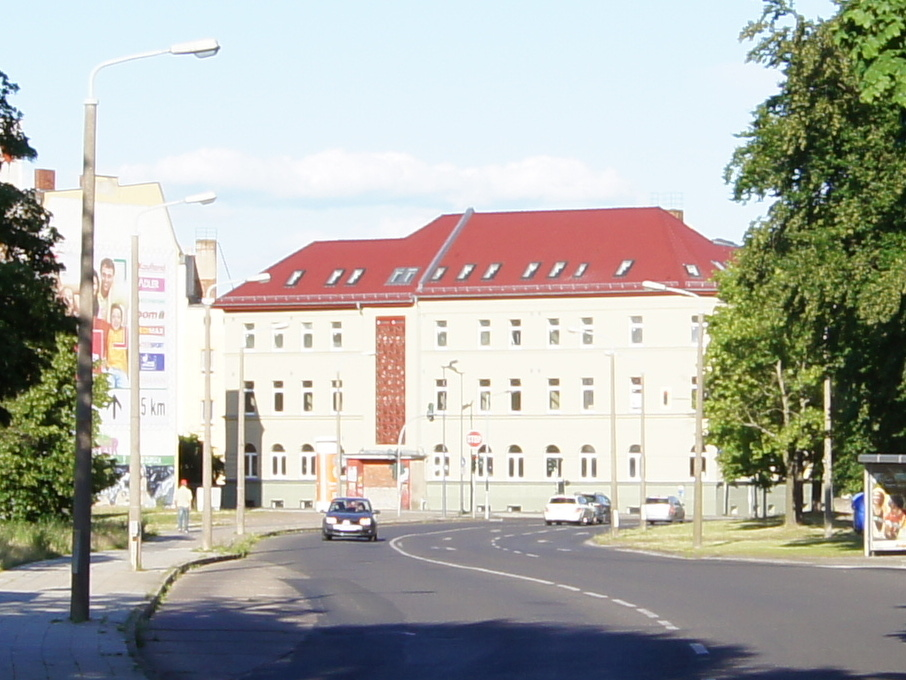 Leipziger Garten / Polonia 2016